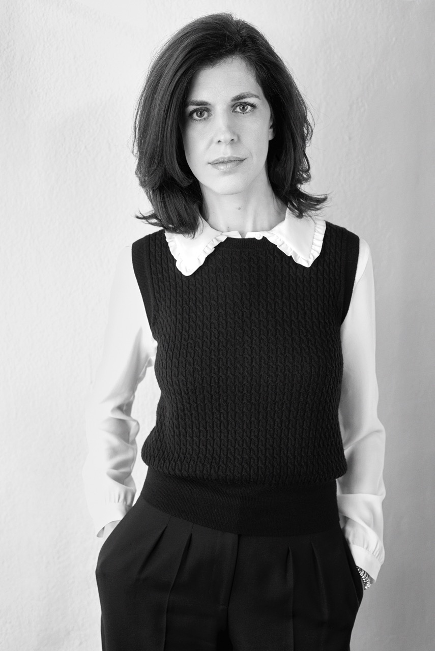 Vanessa Seward par Pierre Bailly, Paris, 2016.